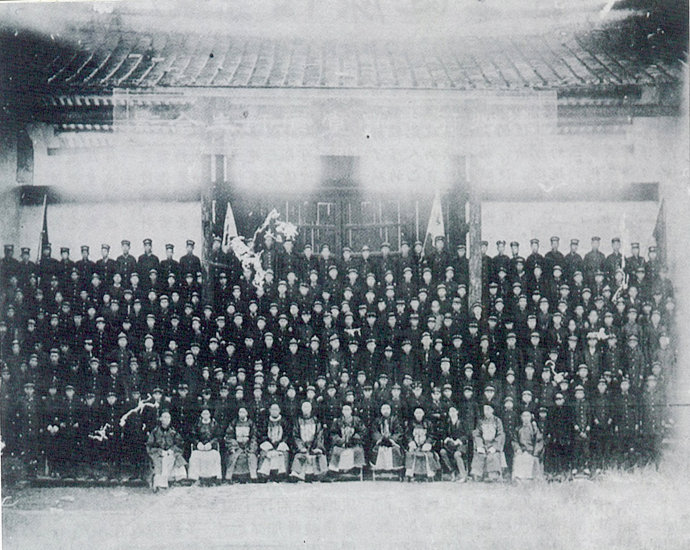 1902漳州府中学堂官师合影